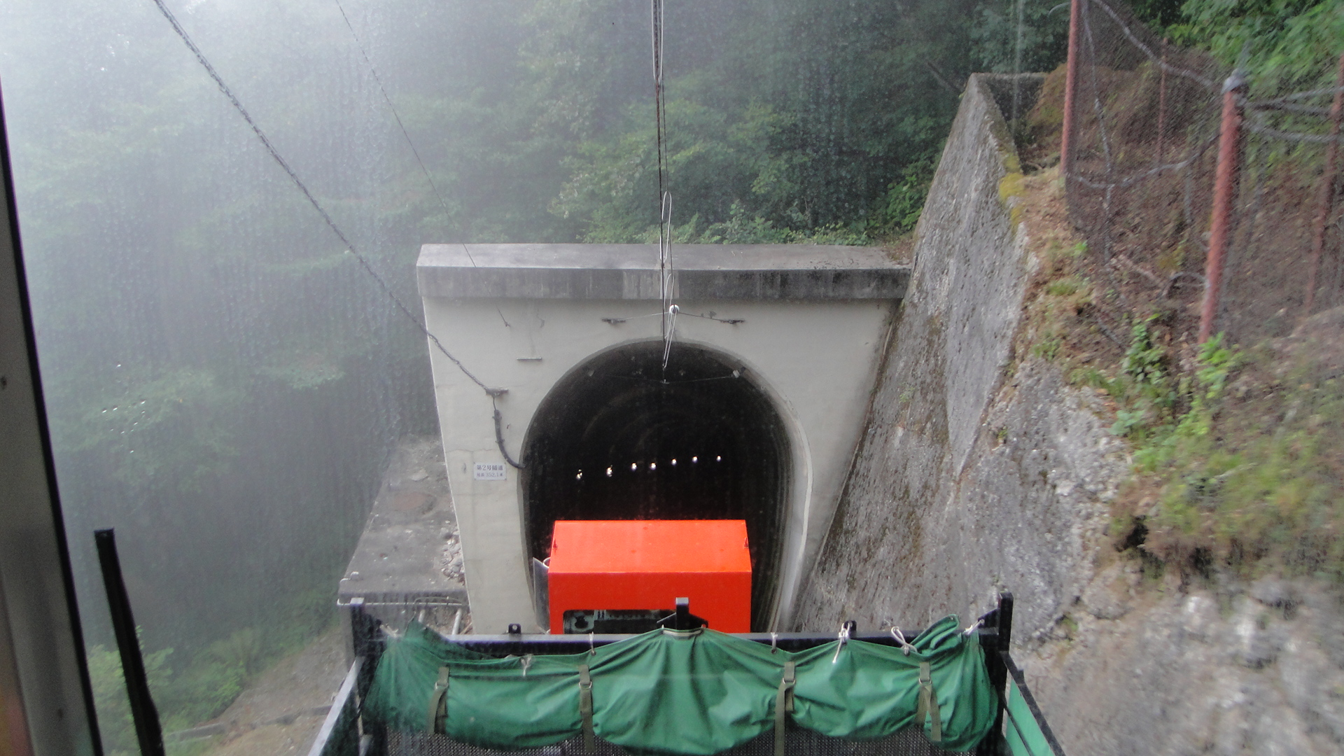 立山ケーブルカー第2号隧道